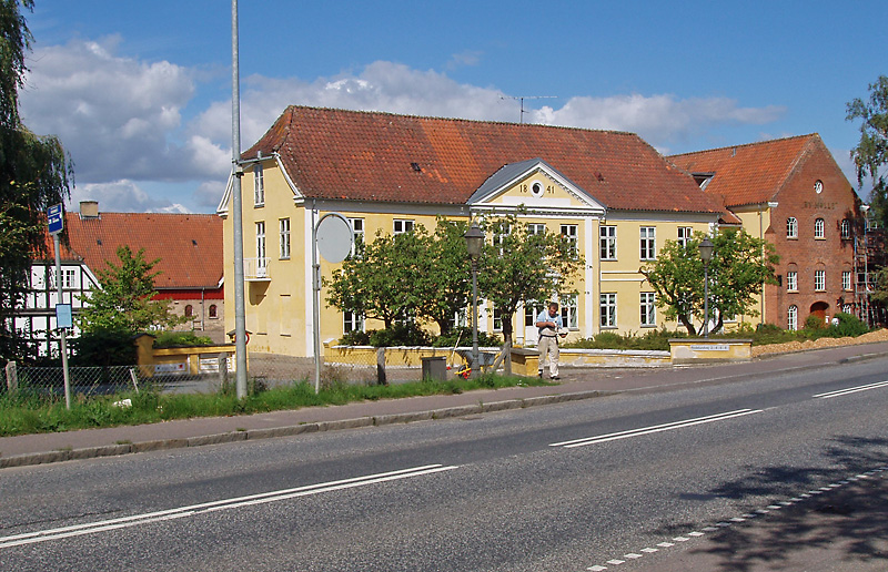 Ry Mølle Hovedbygningen da: Rye Mølle , Ry, Tyrsting Herred, .Århus Amt (tidligere Skanderborg Amt)